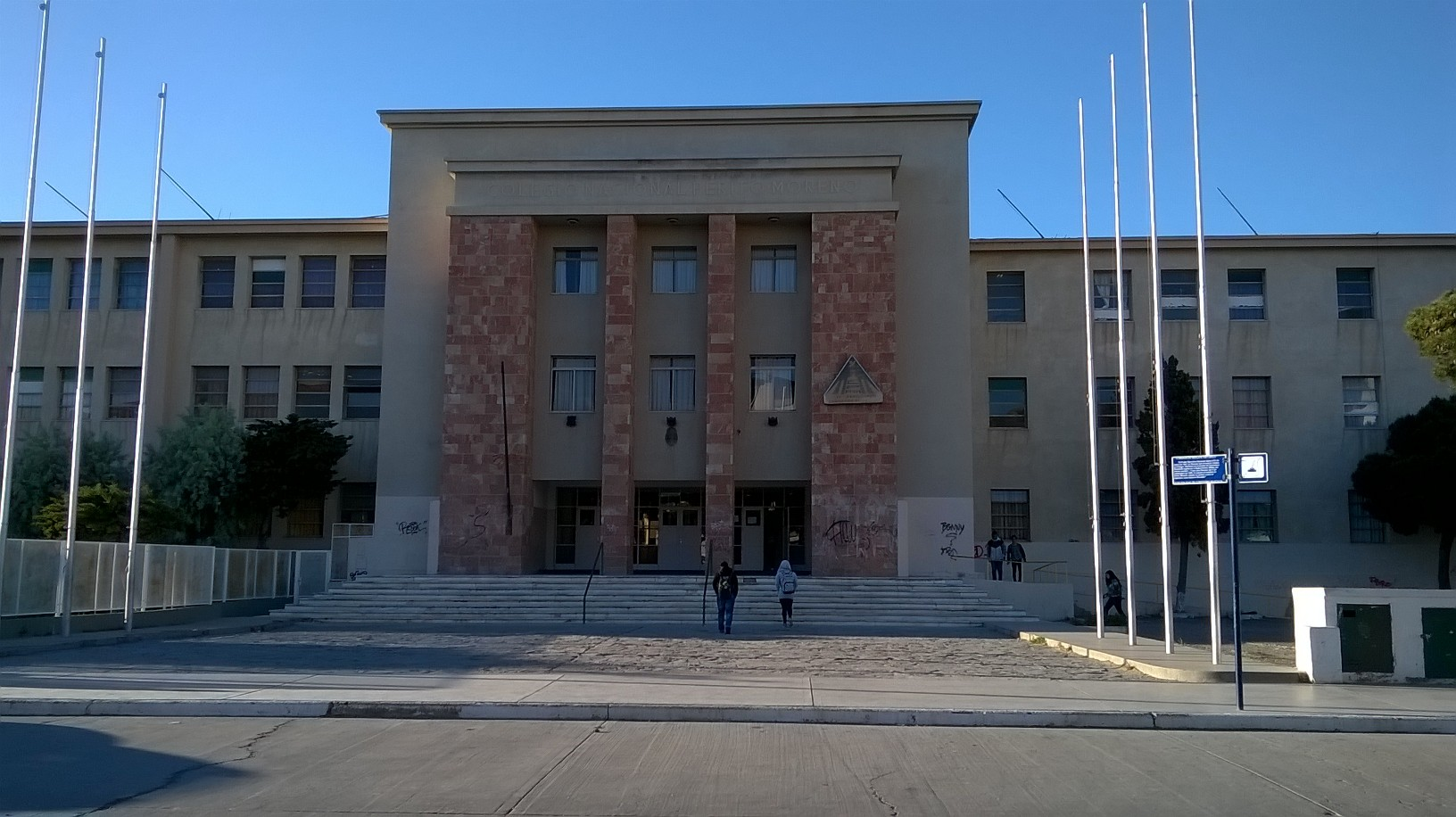 Fachada de la Escuela 766 Perito Moreno, en Comodoro Rivadavia.